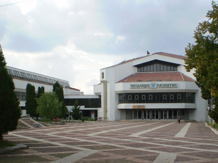 Читалищен комплекс Бяла Слатина